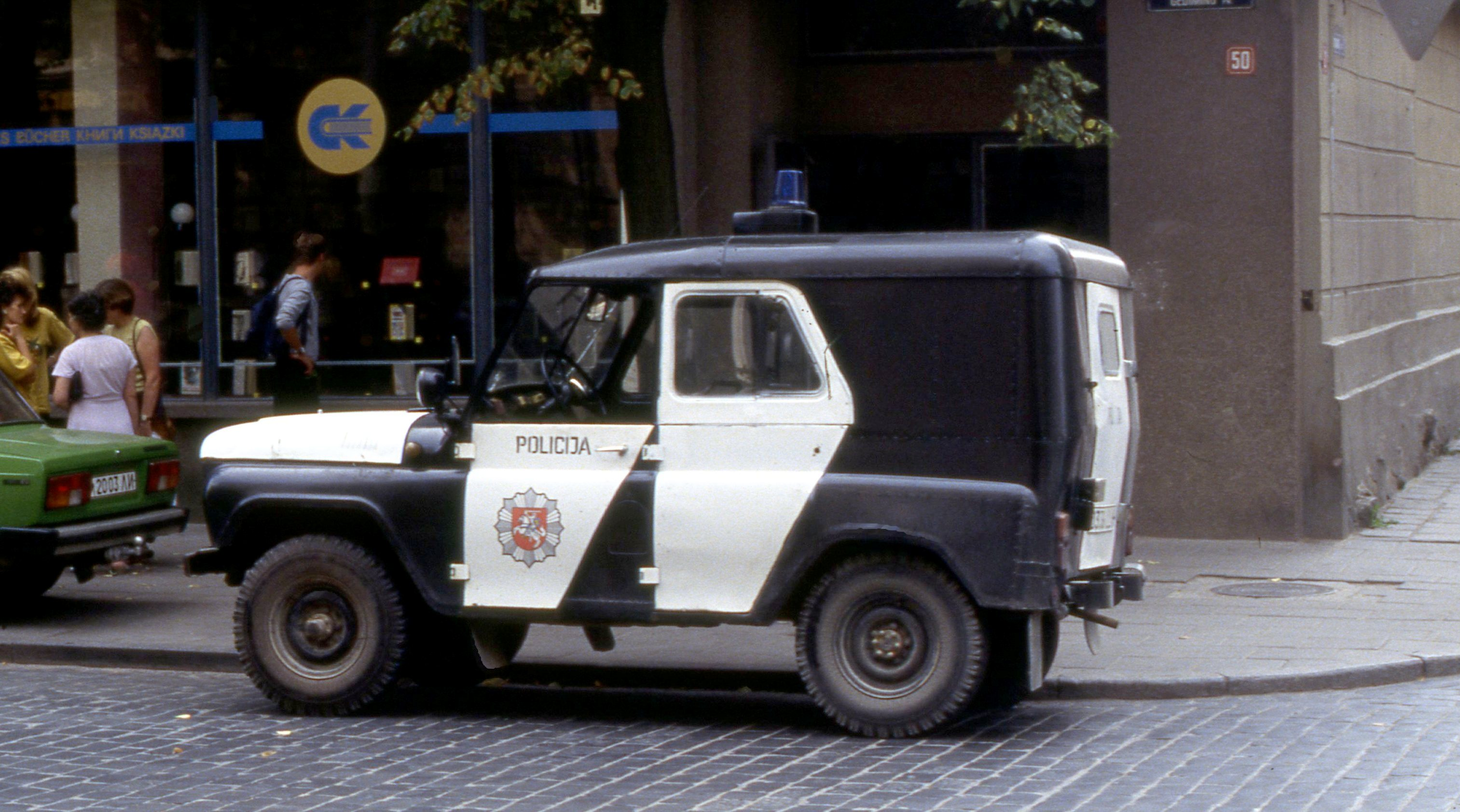 Politie auto in Litouwen